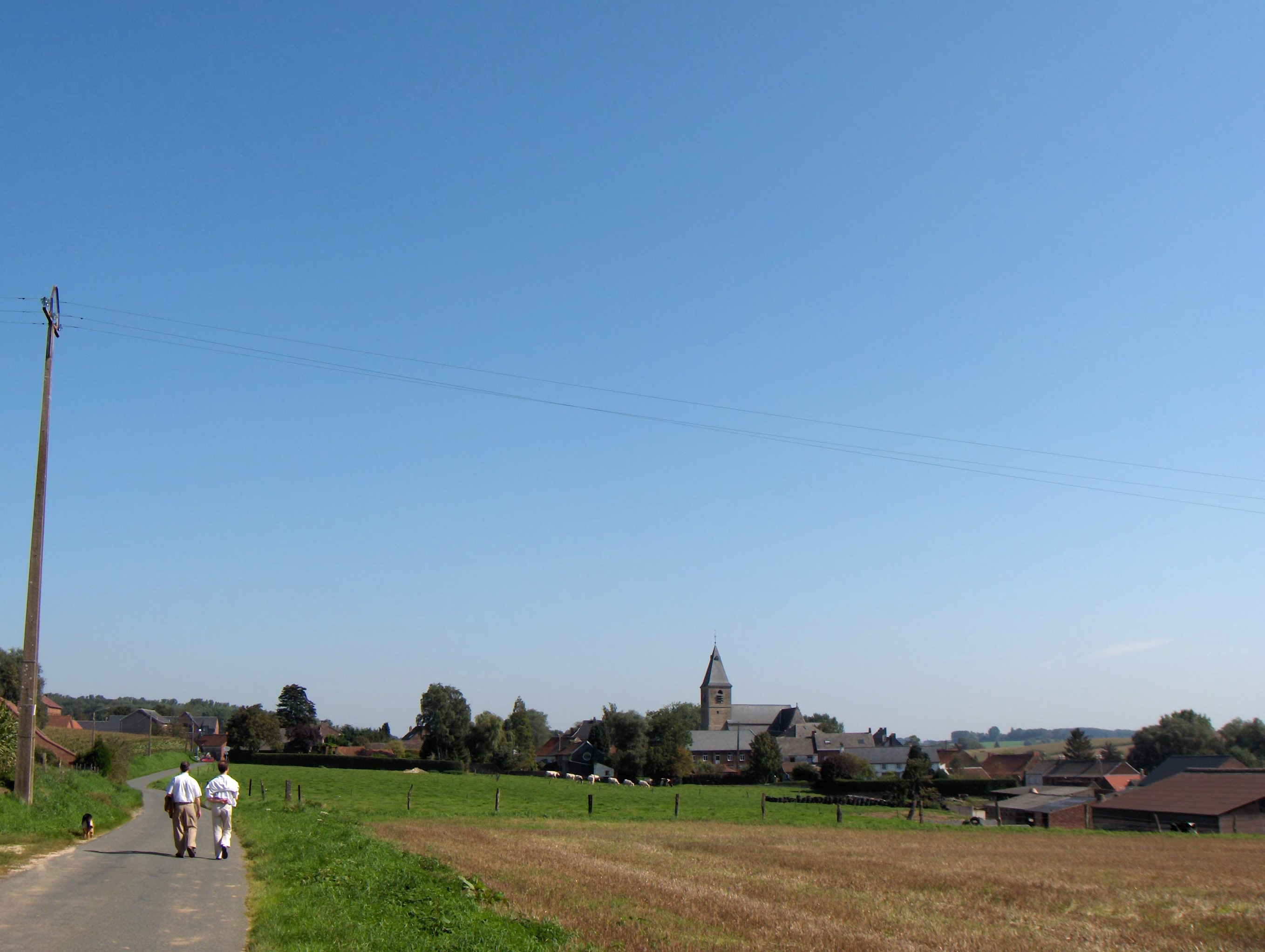 Steenkerque, Ortsteil der Gemeinde Braine-le-Comte, Gesamtansicht des Dorfes von Südwesten, Rue Maréchal de Luxembourg.